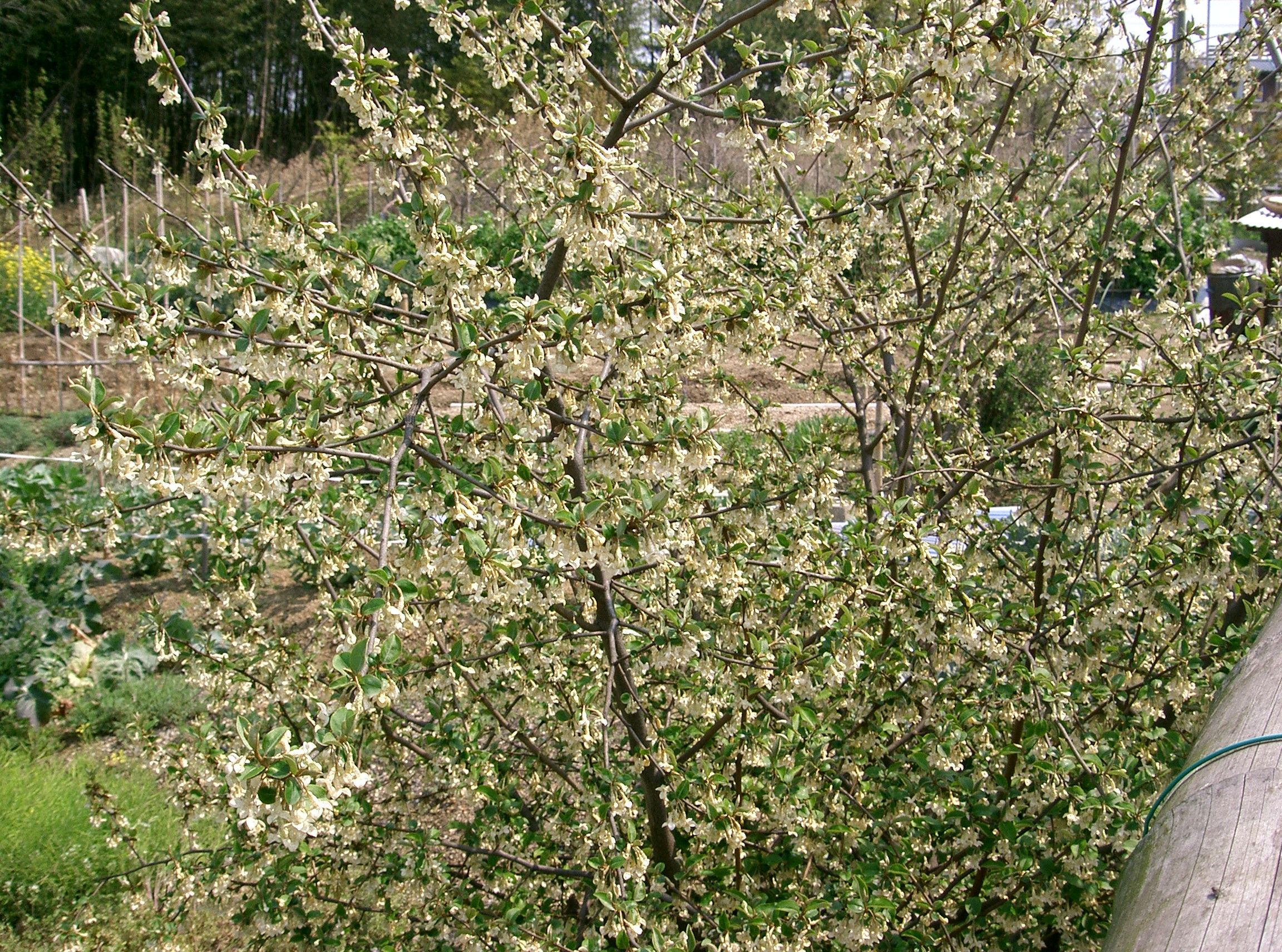 Scientific name Elaeagnus multiflora var. hortensis